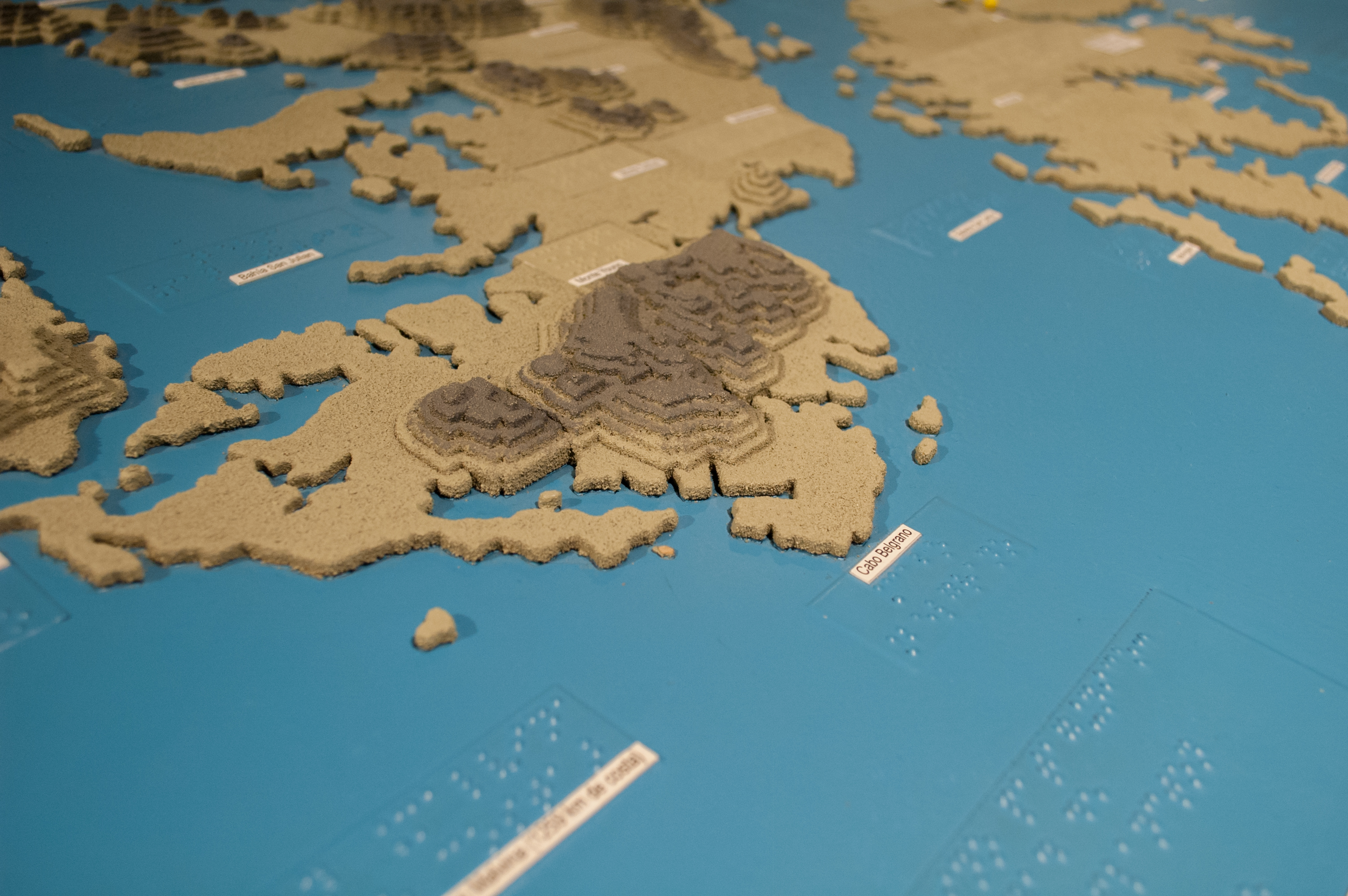 museo malvinas 028 islas